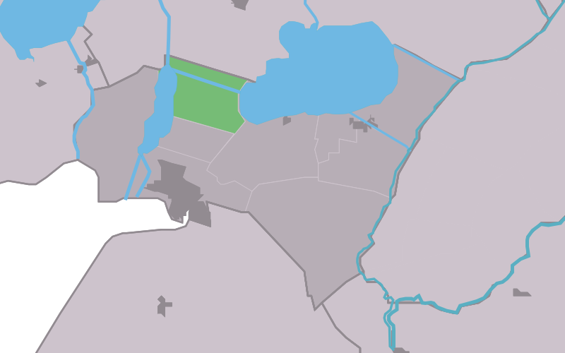 Kaartsje fan himrik fan Follegea